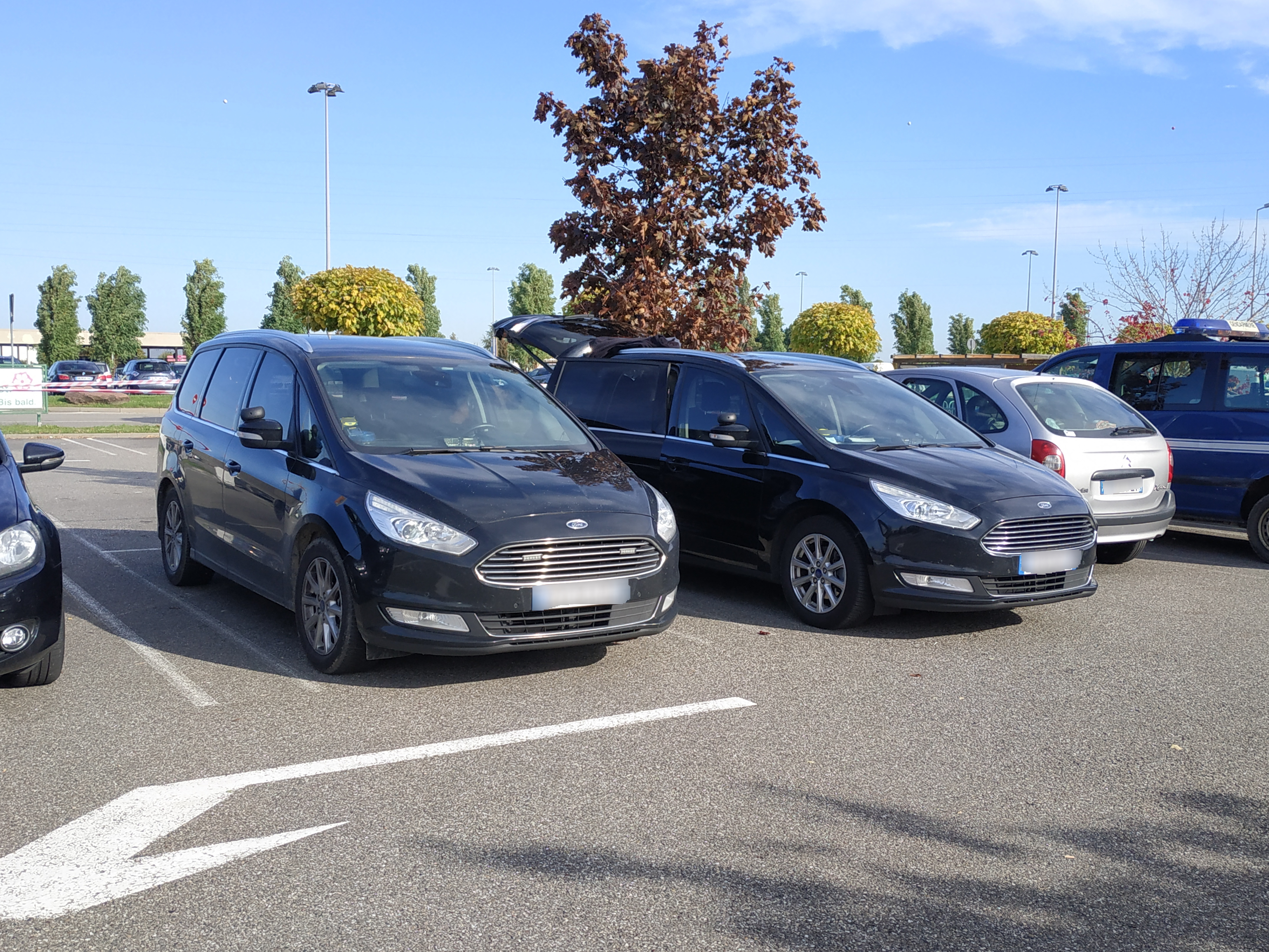 Ford Galaxy de la police nationale, service du RAID Photo prise à Mundolsheim dans le cadre des rencontres de la sécurité intérieure de 2019